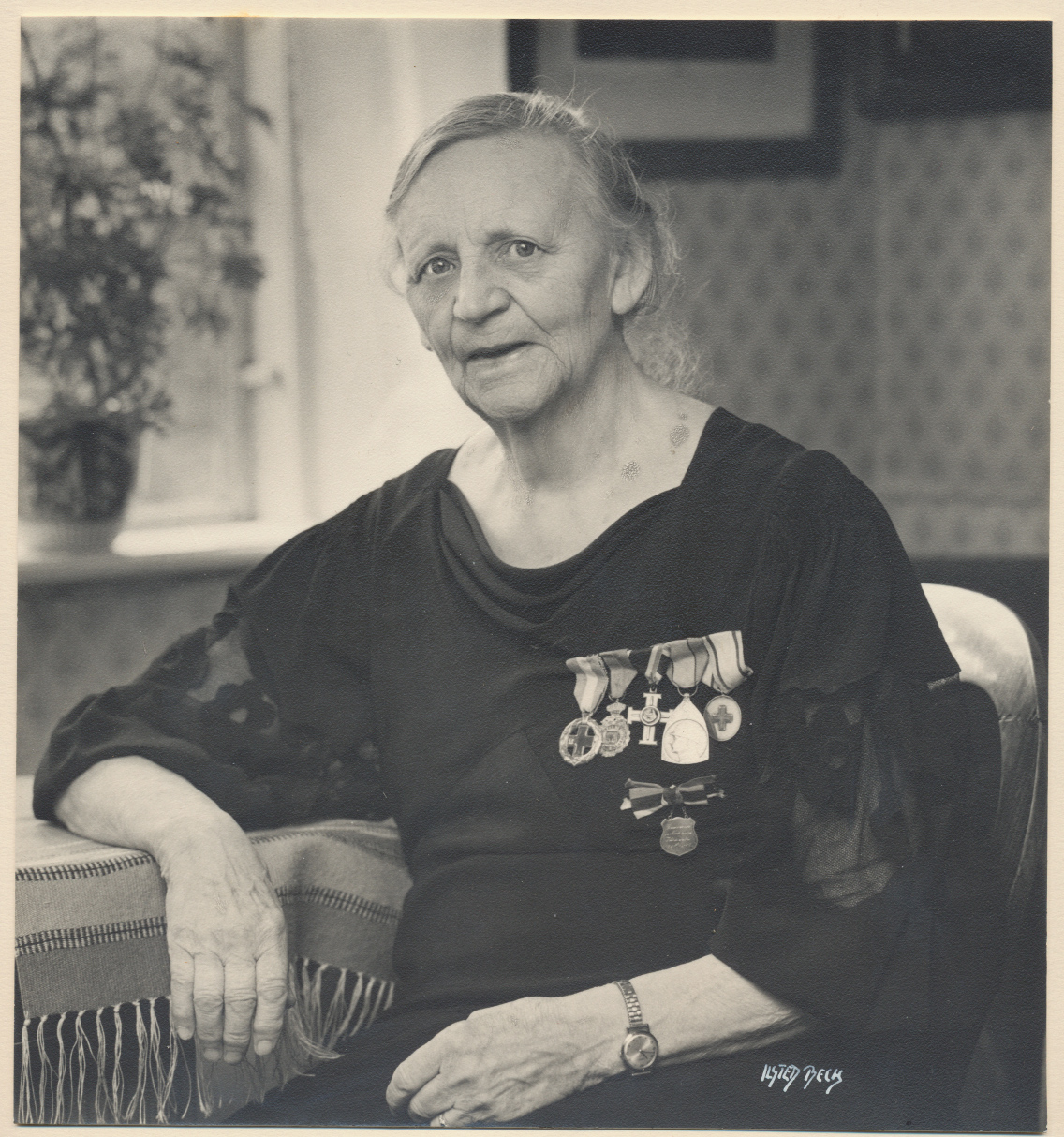 Portræt af Valborg Hjorth med medajler fra krigshjælpearbejde under 1. Verdenskrig